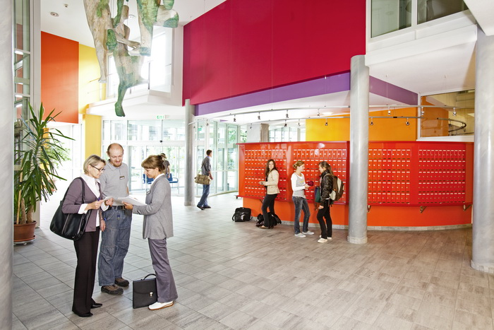 Eingangsbereich des ISH